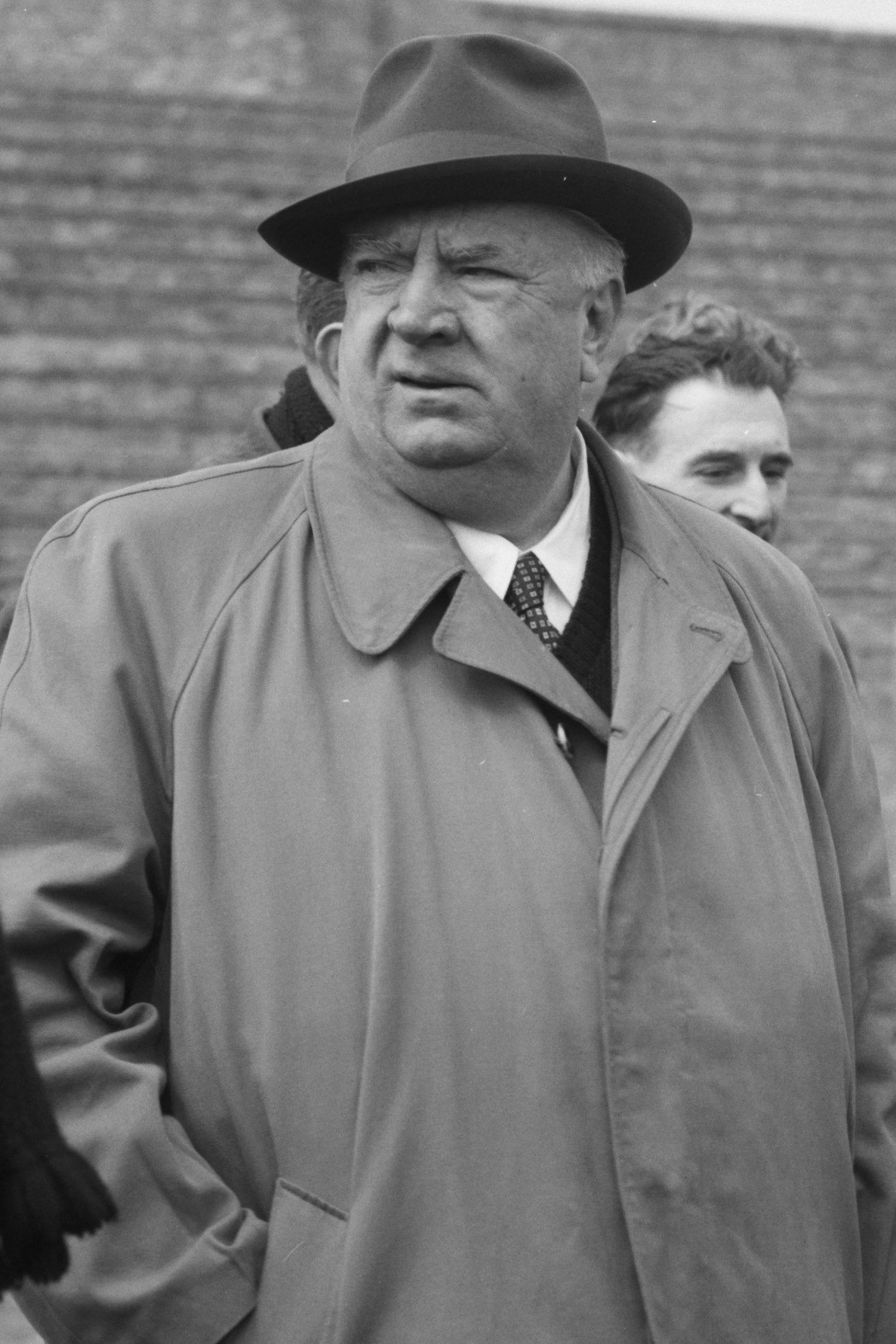 Alfred Neubauer